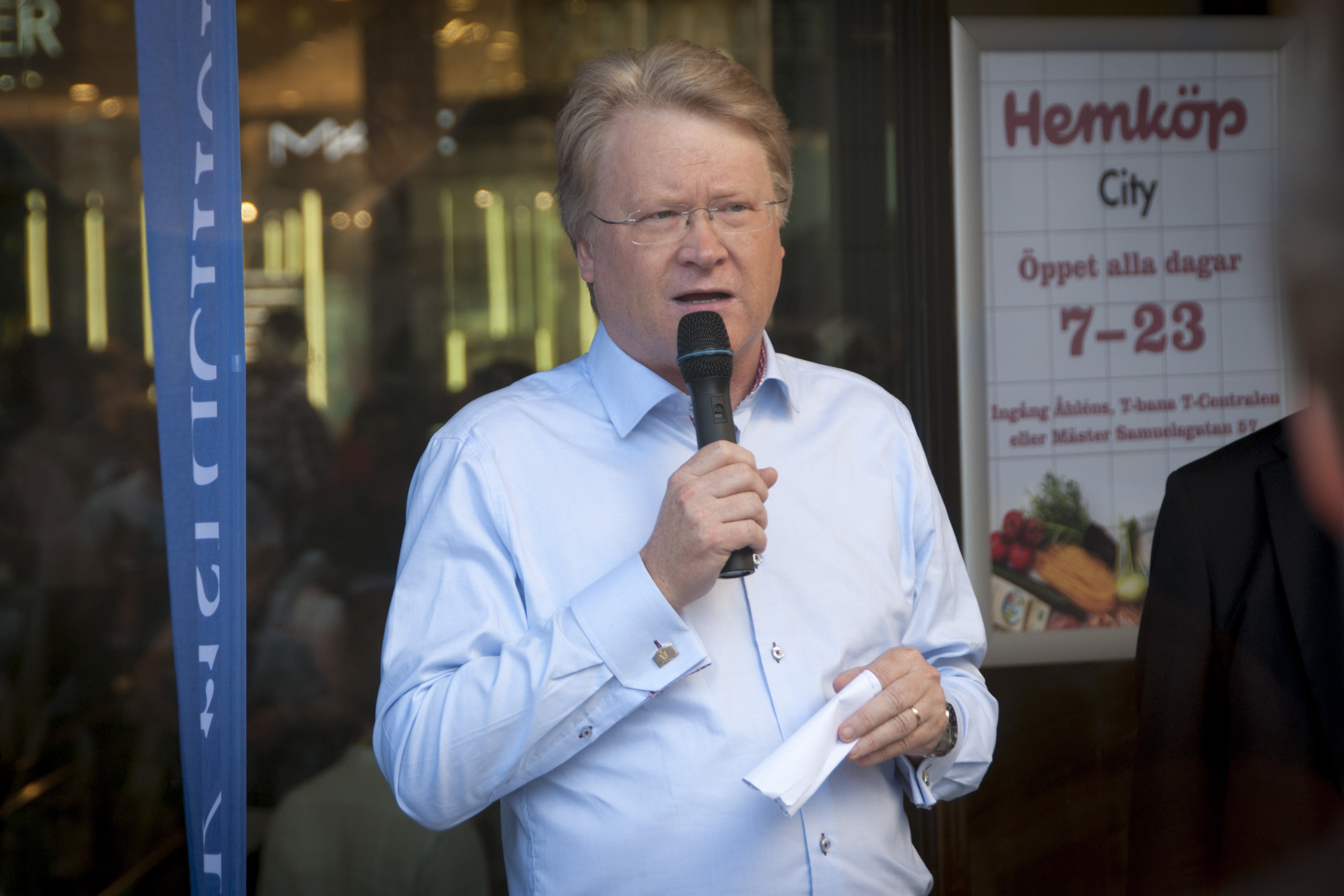 Lars Adaktusson kampanjar utanför Åhlens i EU-valet 2014